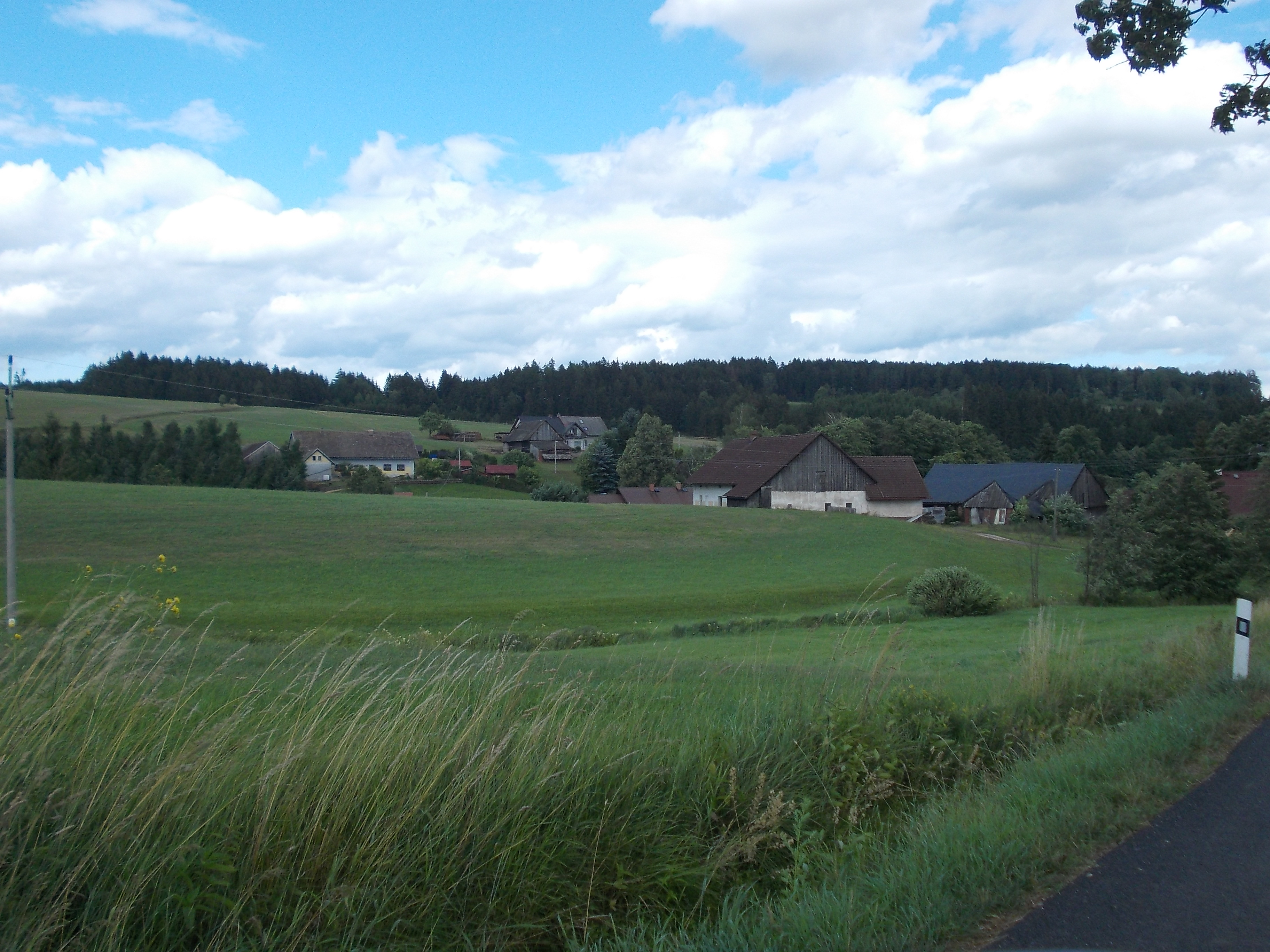 Horní Kalná - celkový pohled od západu